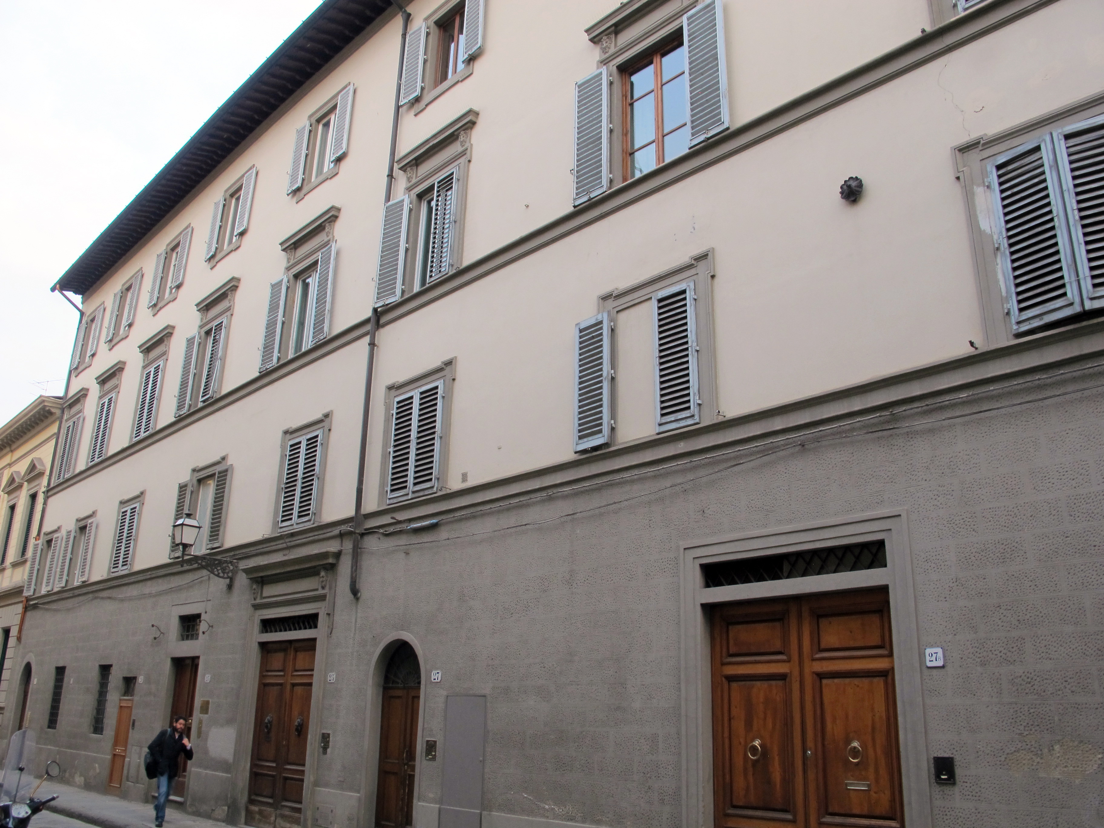 Via ghibellina 23, Ex Teatro Brendel